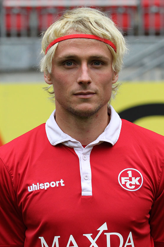 Tim Heubach